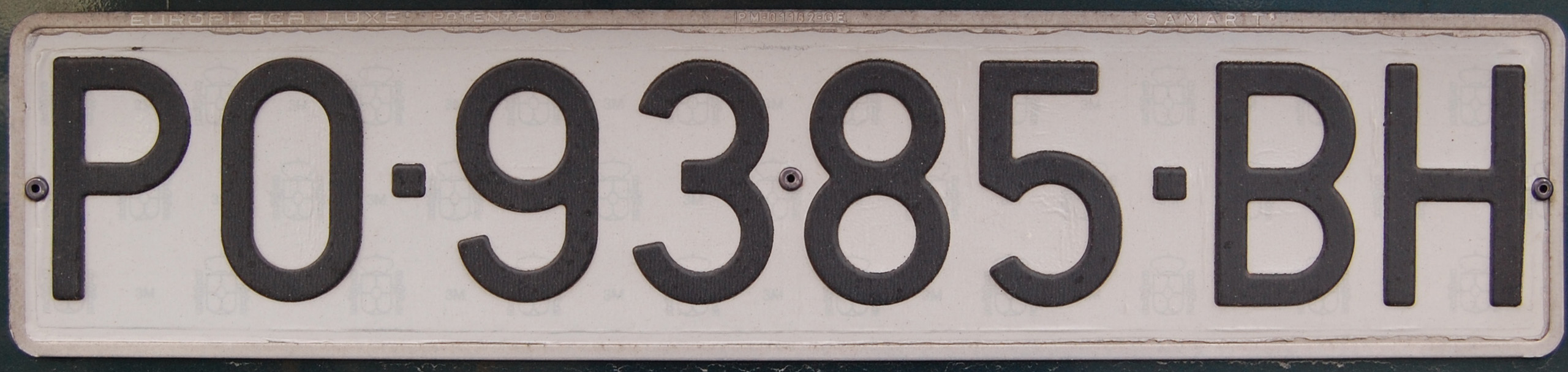 Placa de matrícula de Espanha modelo antigo. A sigla "PO" diz respeito à província de Pontevedra.